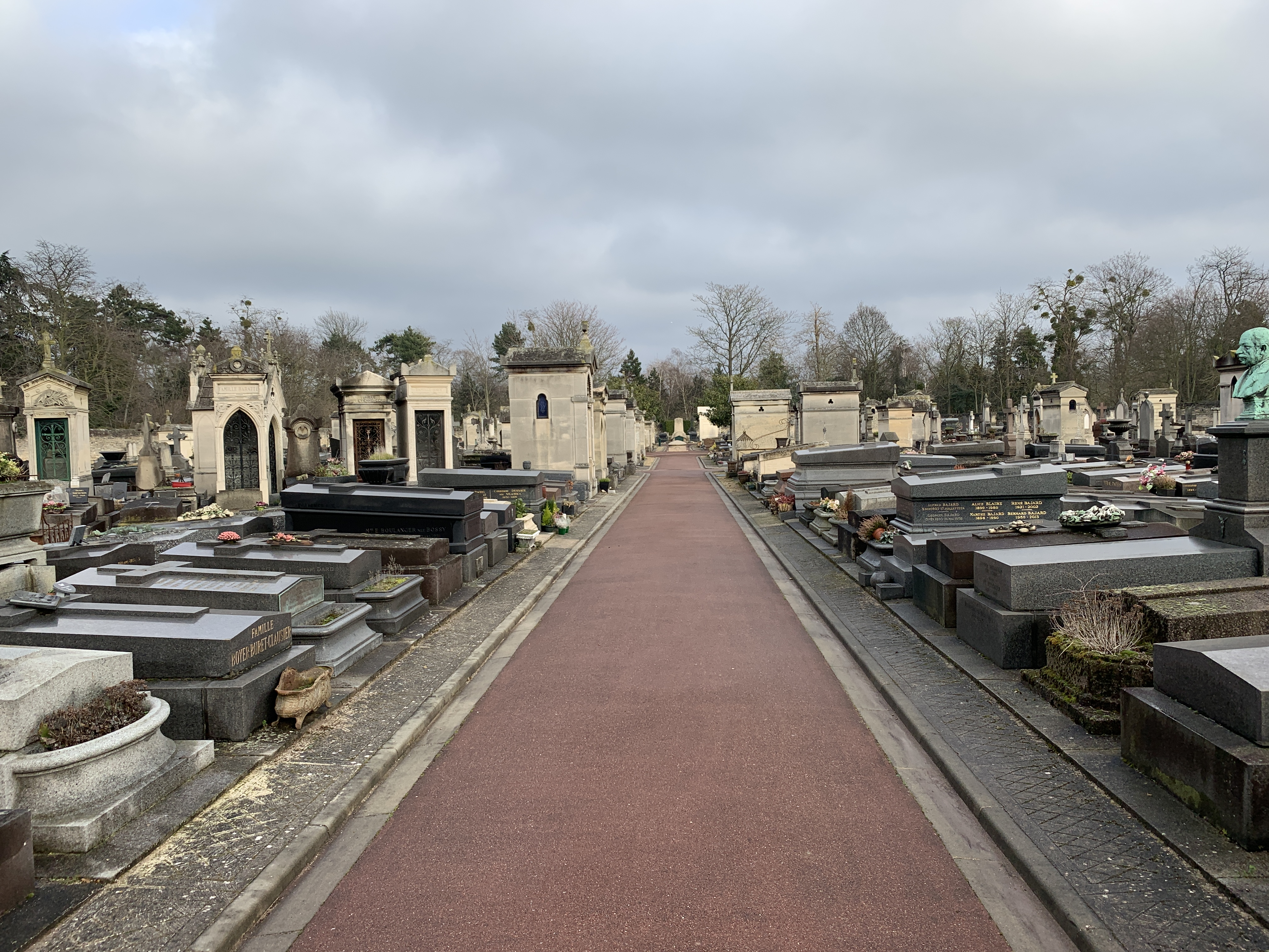 Cimetière ancien de Charenton-le-Pont, Paris.